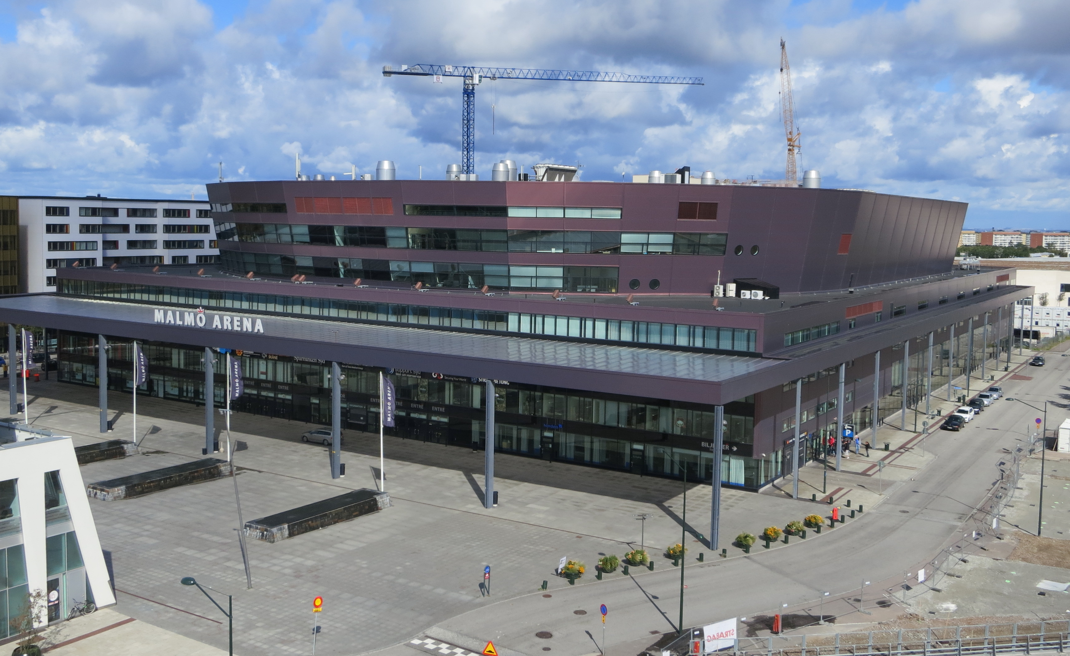 Malmö Arena i augusti 2014